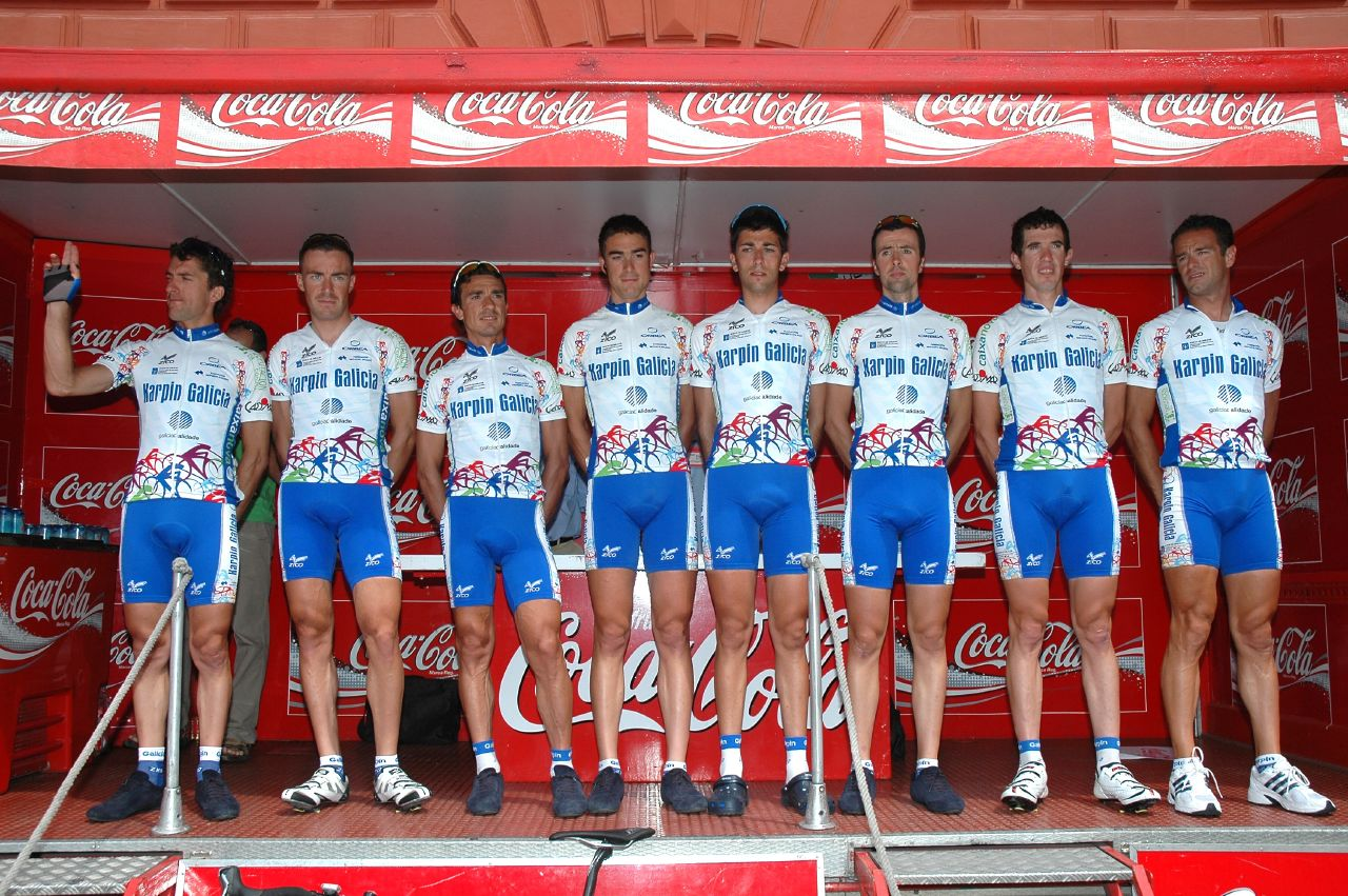 Karpin-Galicia 2007